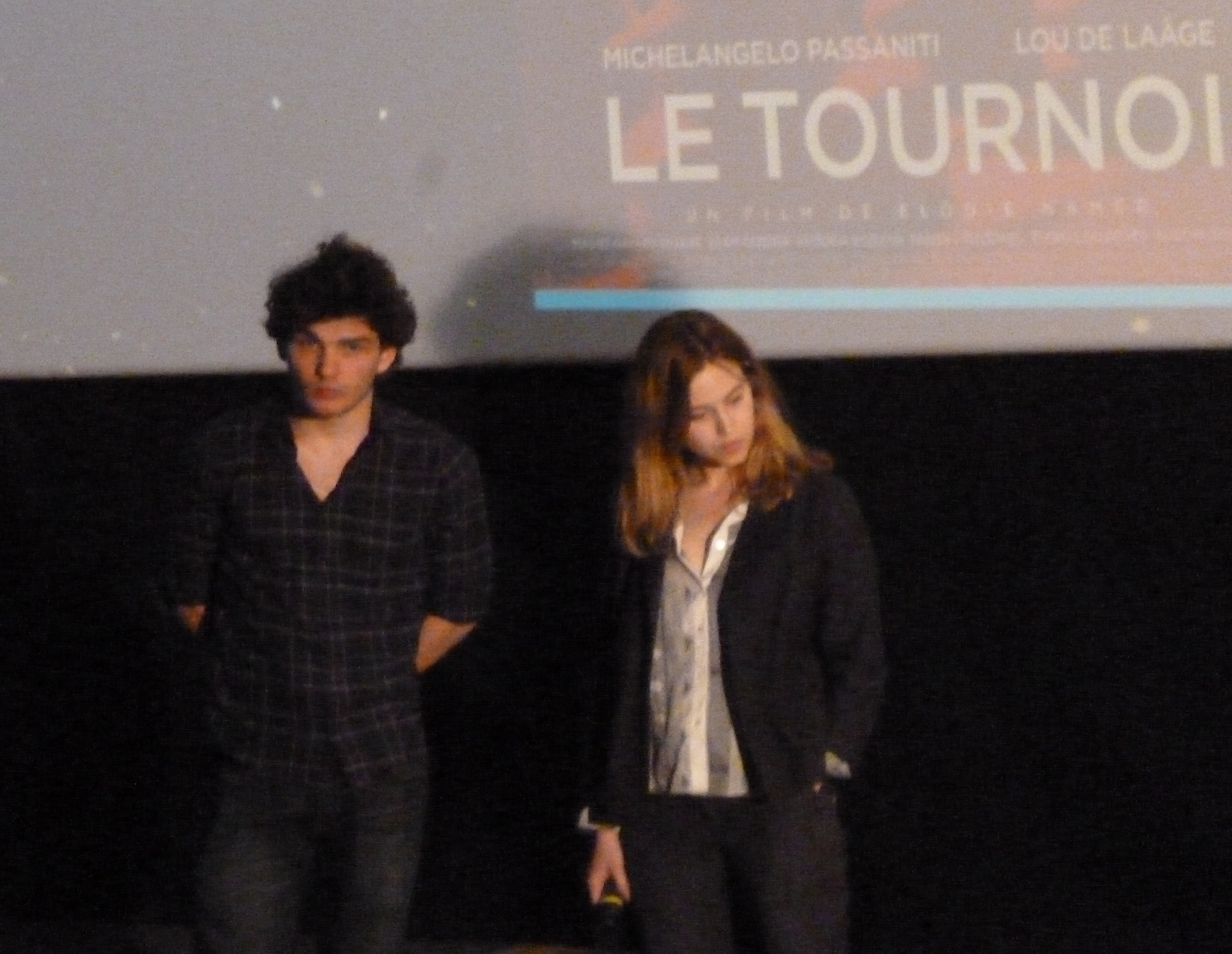 L'acteur français Michelangelo Passaniti et l'actrice française Lou de Laâge, le 15 avril 2015, à l'avant-première du film Le Tournoi, à Beauvais.